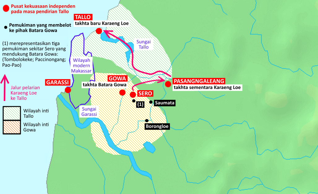 Pendirian Kerajaan Tallo pada akhir abad ke-15